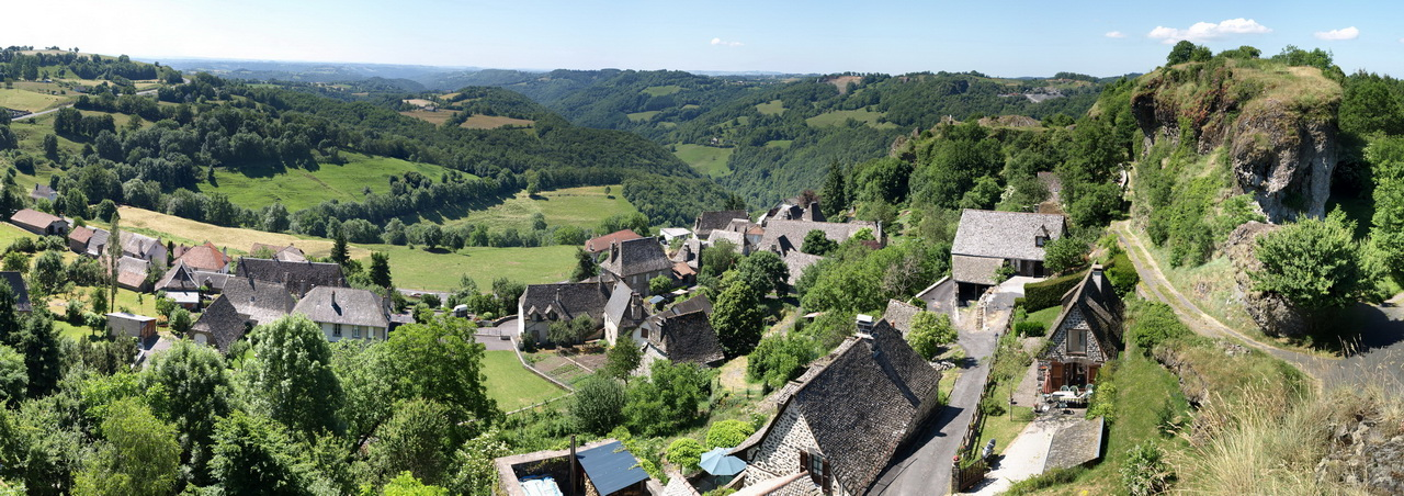 Vue générale du village de Carlat et de son rocher, situés dans le Cantal